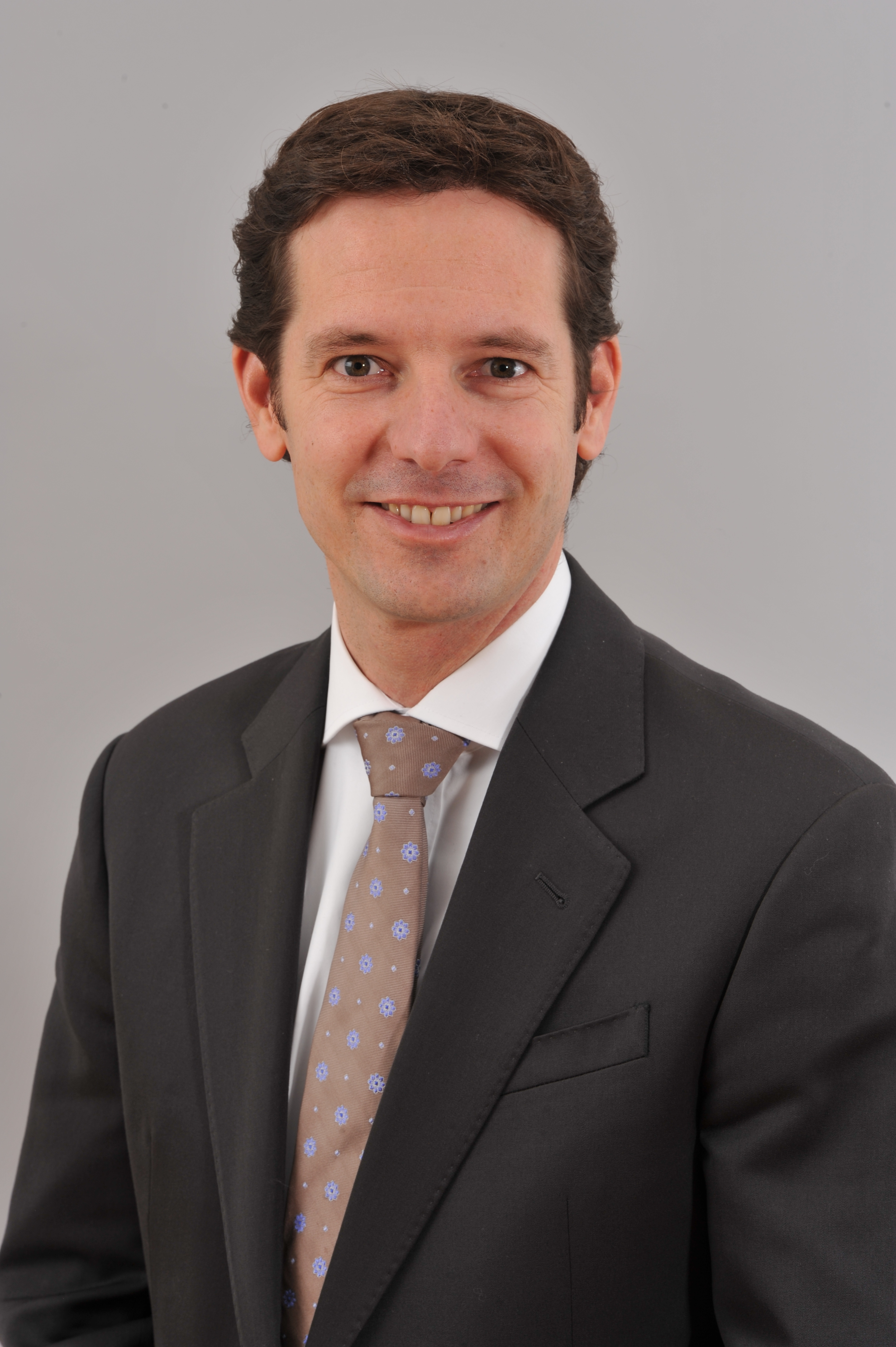 Landtagsprojekt Salzburg: David Brenner